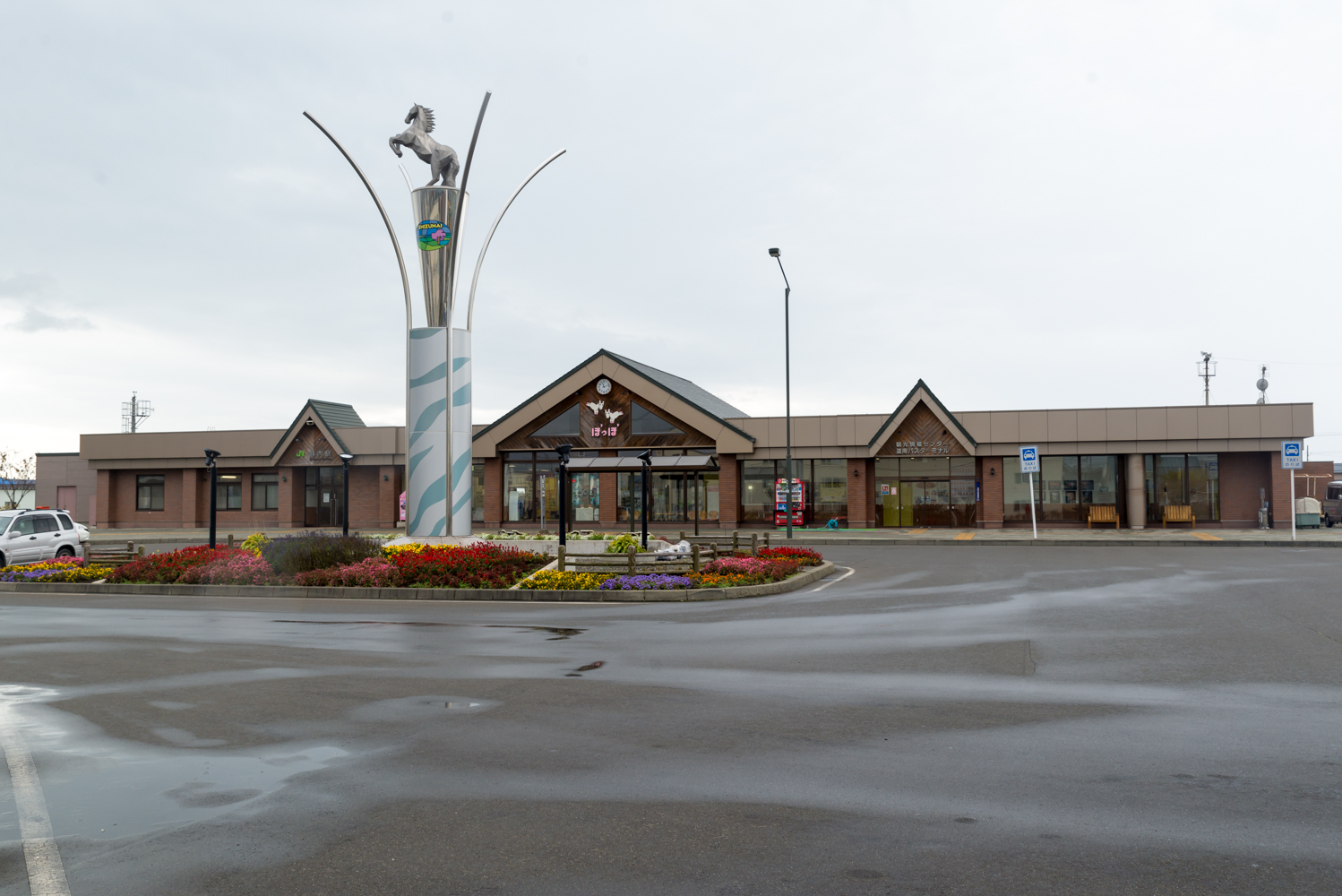 北海道旅客鉄道株式会社日高本線静内駅駅舎